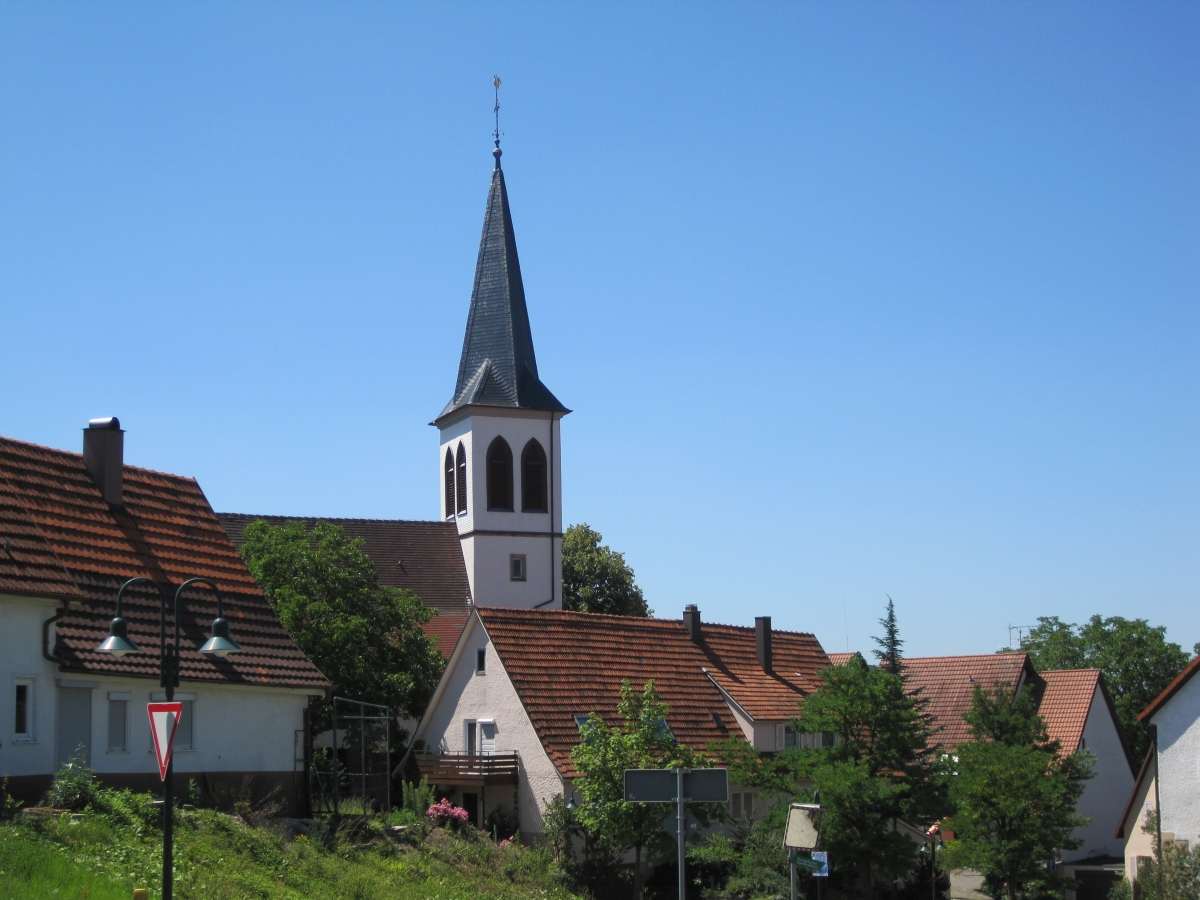 Evangelische Andreaskirche Großbettlingen. 1497 an Stelle eines Vorgängerbaus aus dem 8. Jahrhundert erbaut.